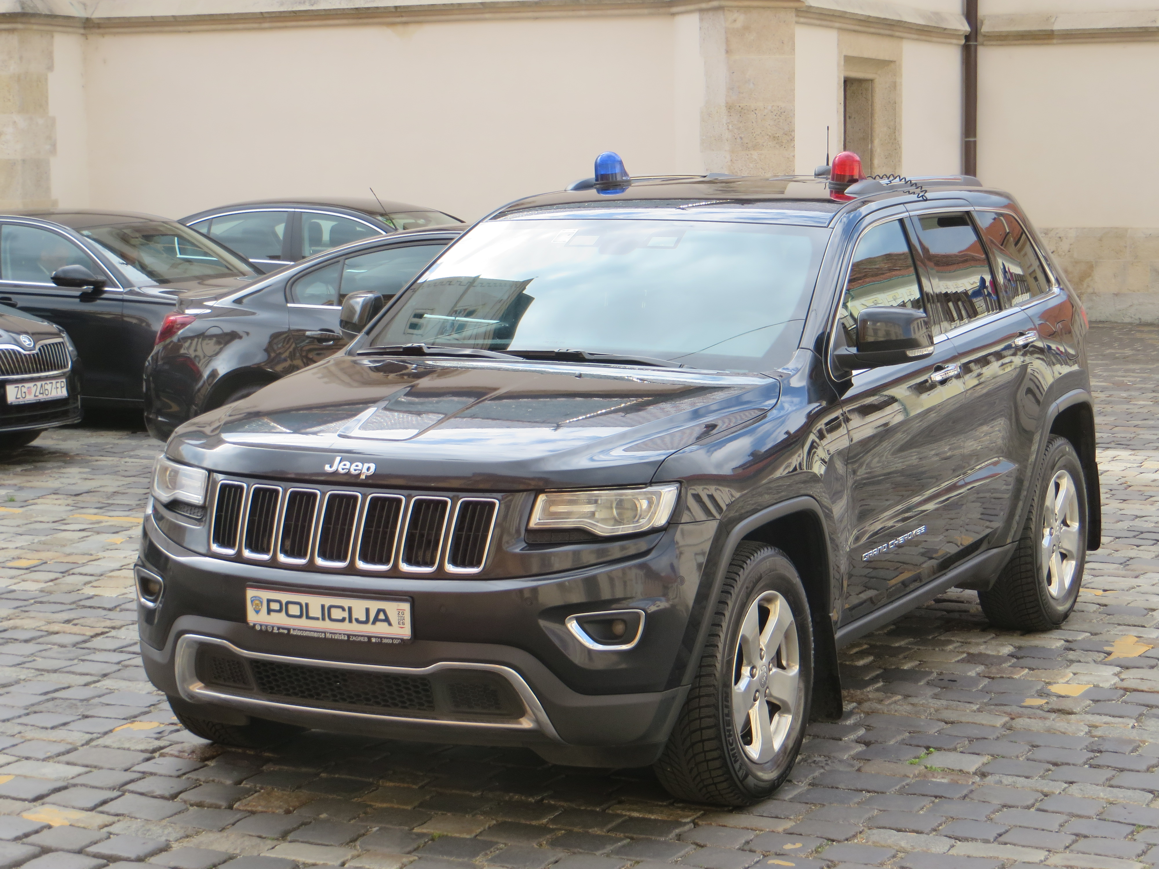 Politie auto Kroatië